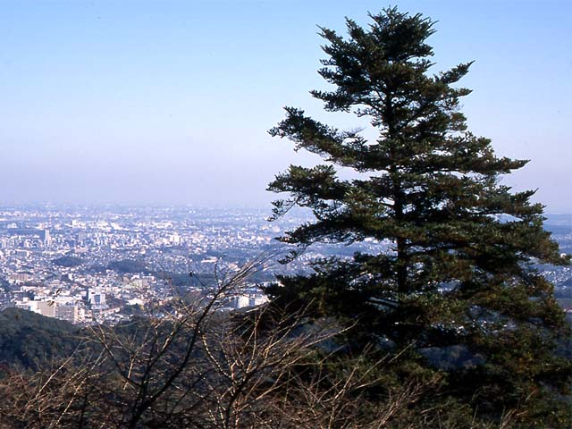 Abies firma y ciudad Tokyo desde Mt.Takao. 高尾山から、モミの樹形と背後に東京の町並み。